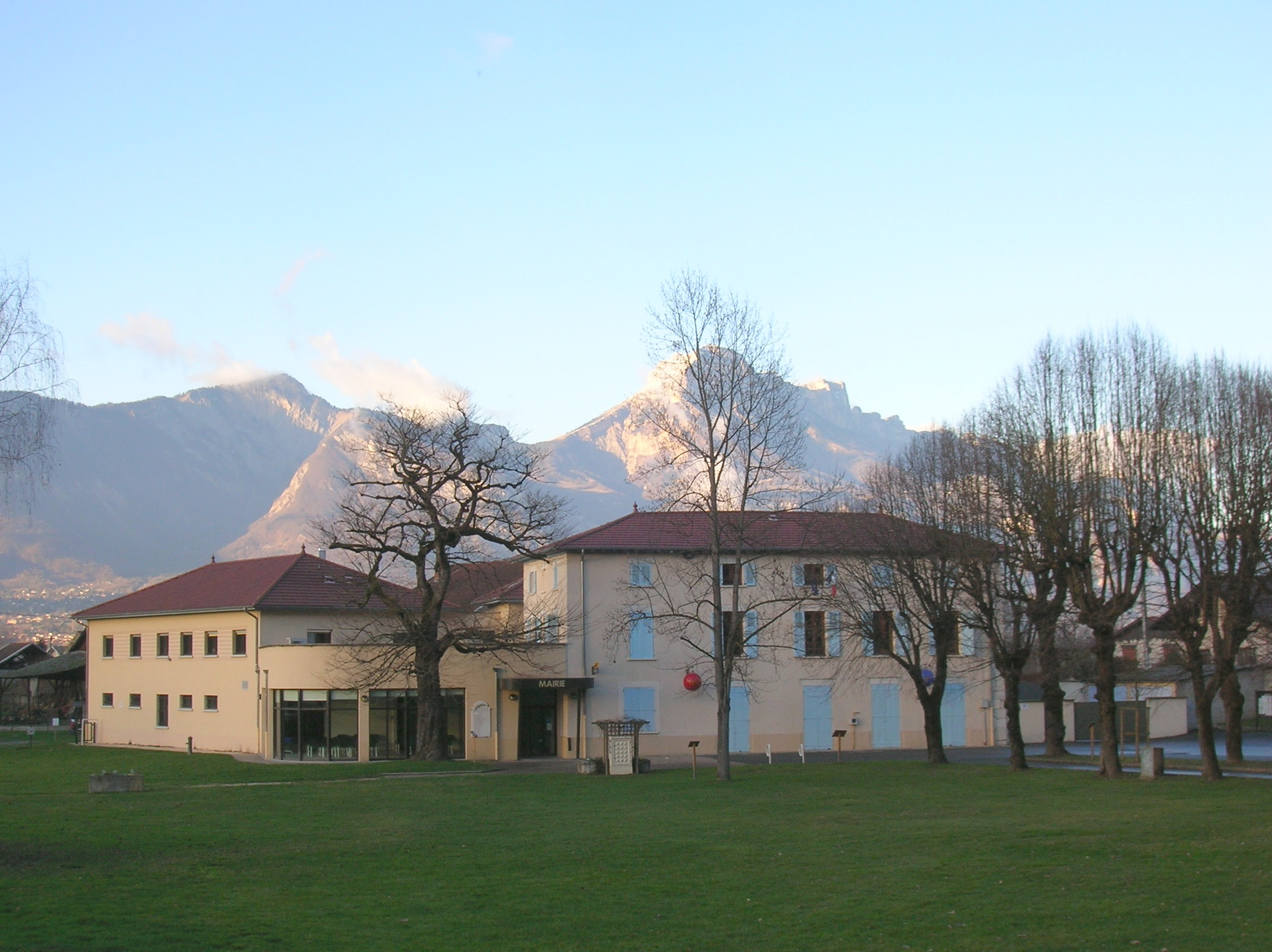 mairie Le Versoud, Isère, Rhône-Alpes, France.